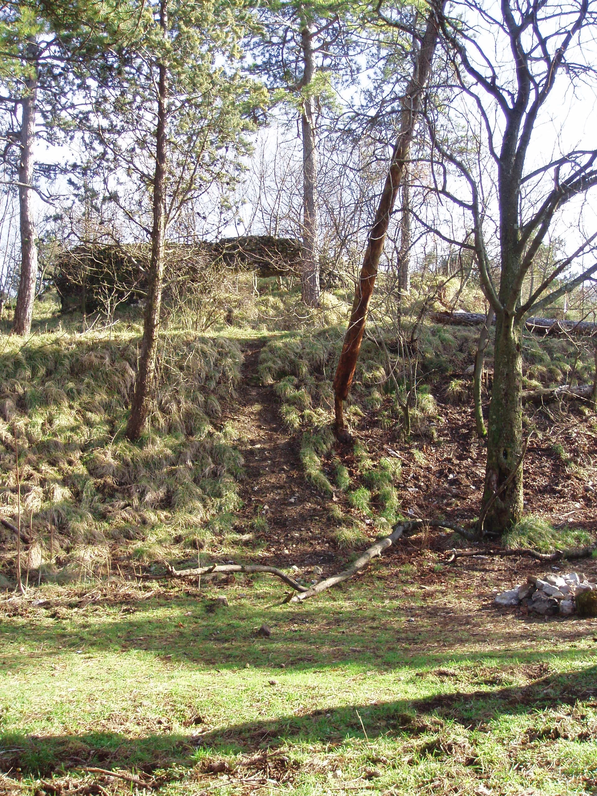 Slika ostankov Muhovega gradu iz zahodne strani februarja 2010